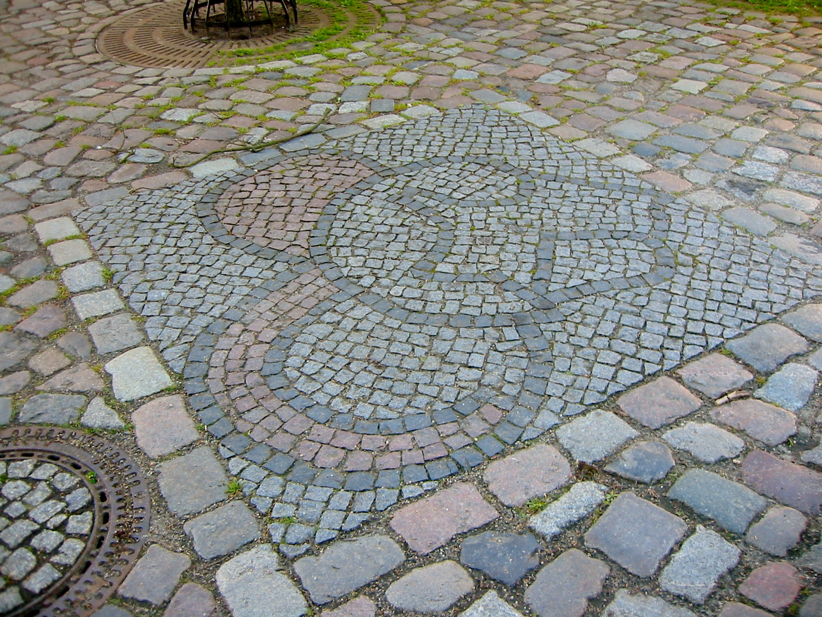 Mosaik nördlich der St. Marienkirche in Bernau bei Berlin. Bei Arbeiten am Kirchplatz wurden Fundamente einer bislang einmaligen Glockengussanlage gefunden. Das Mosaik zeigt die Stelle mit einer Glockenform als Kreis sowie vier Feuerungskanälen als rote Mosaikflächen. Südlich des Mosaiks befindet sich ein Findling mit einer Informationstafel.